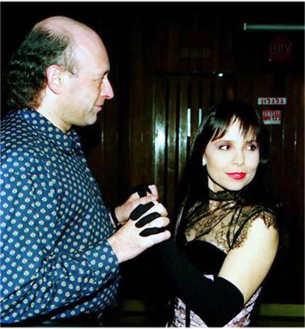 דורון סלומון עם אשתו, השחקנית ניצה שאול